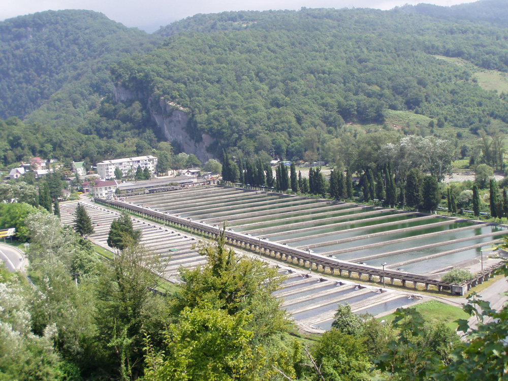 16 May 2007 Участник:Yufereff